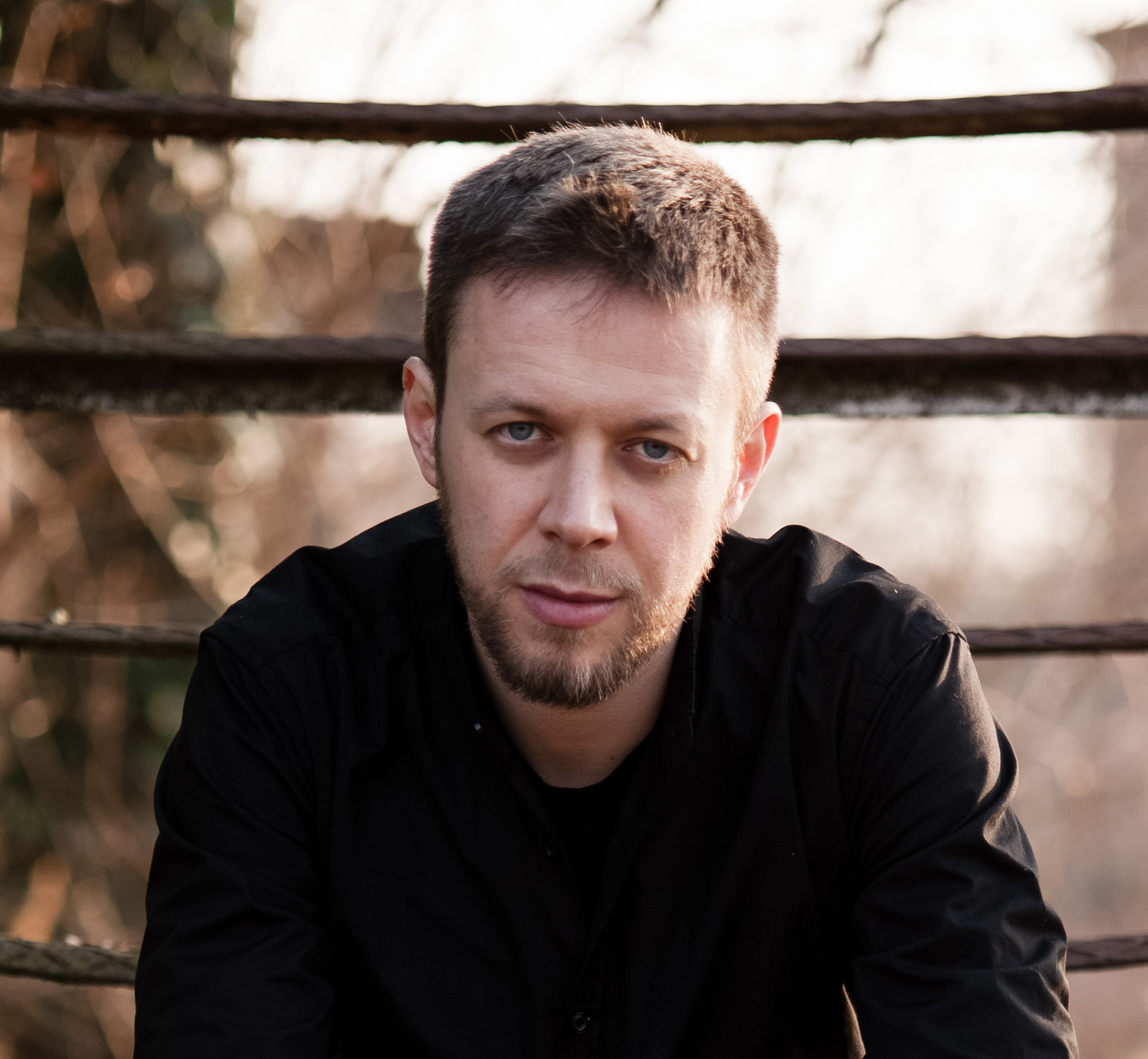 Marco Cortesi - Attore